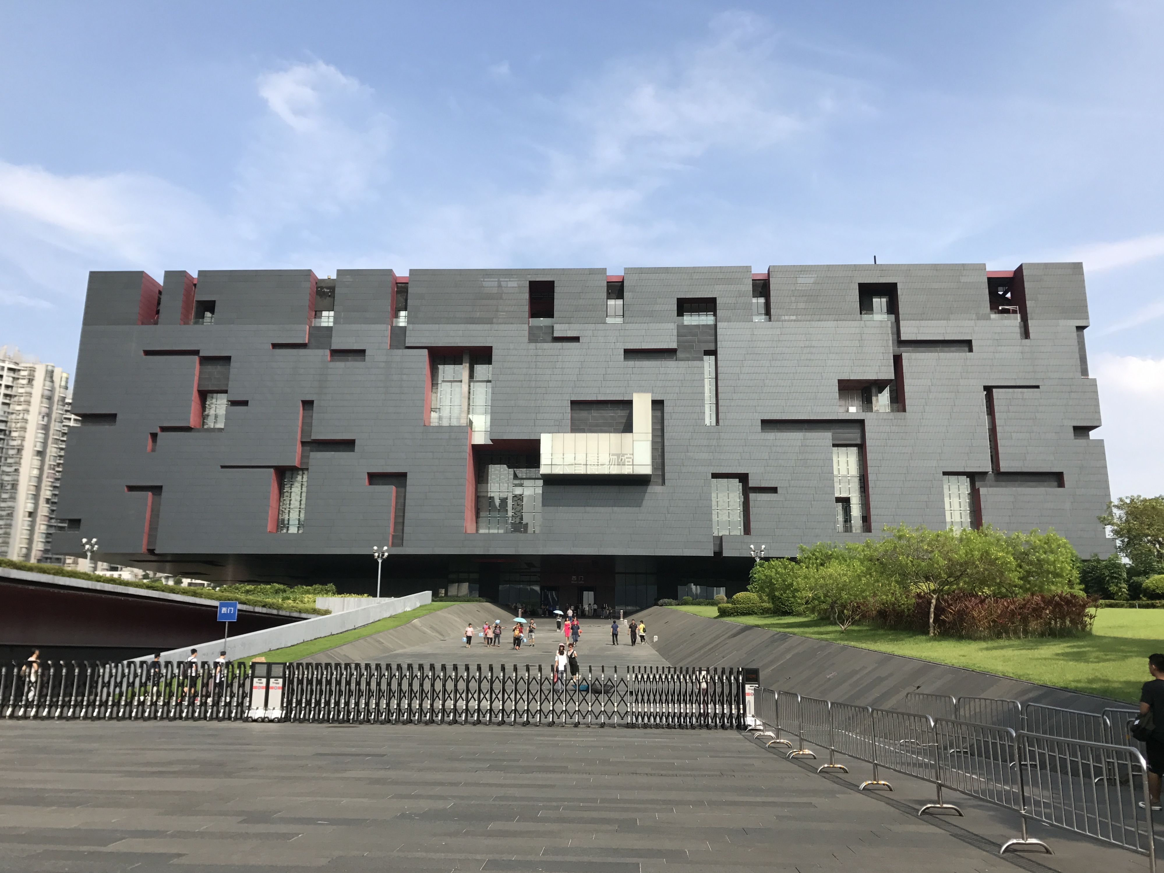 広東省博物館